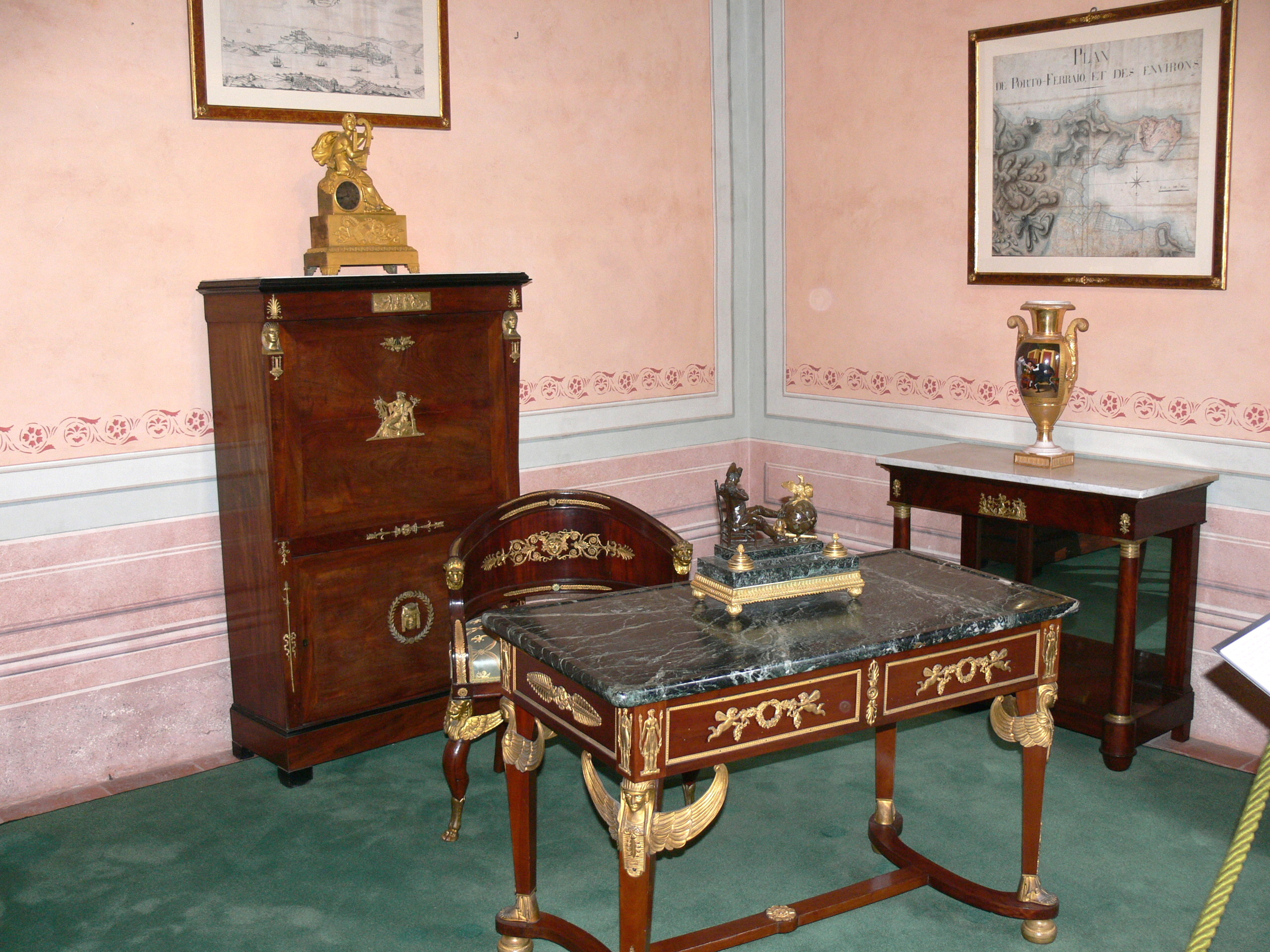 Portoferraio on Elba. Villa Mulini: Napoleon´s study.